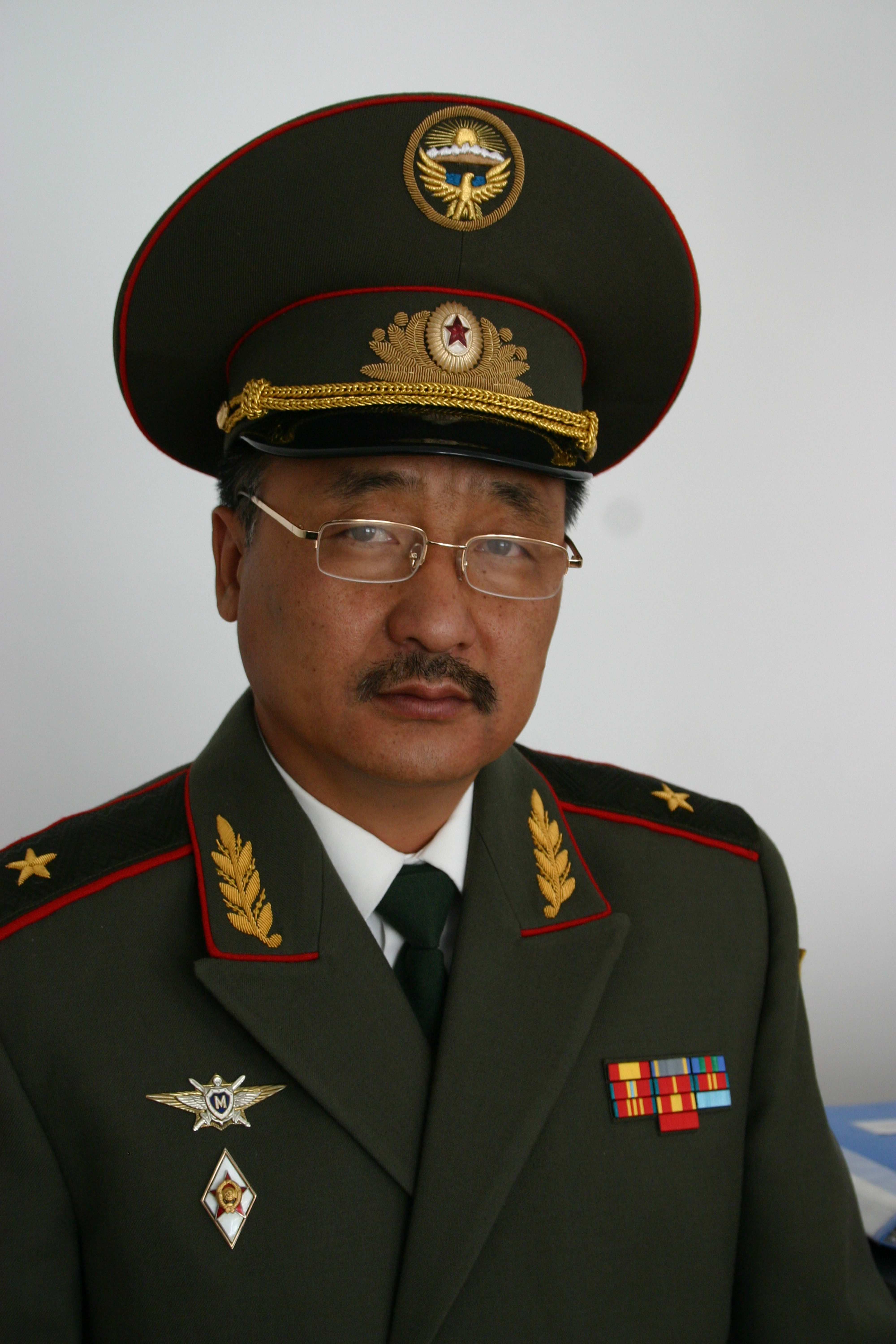 Генерал-Майор Югай Борис Александрович